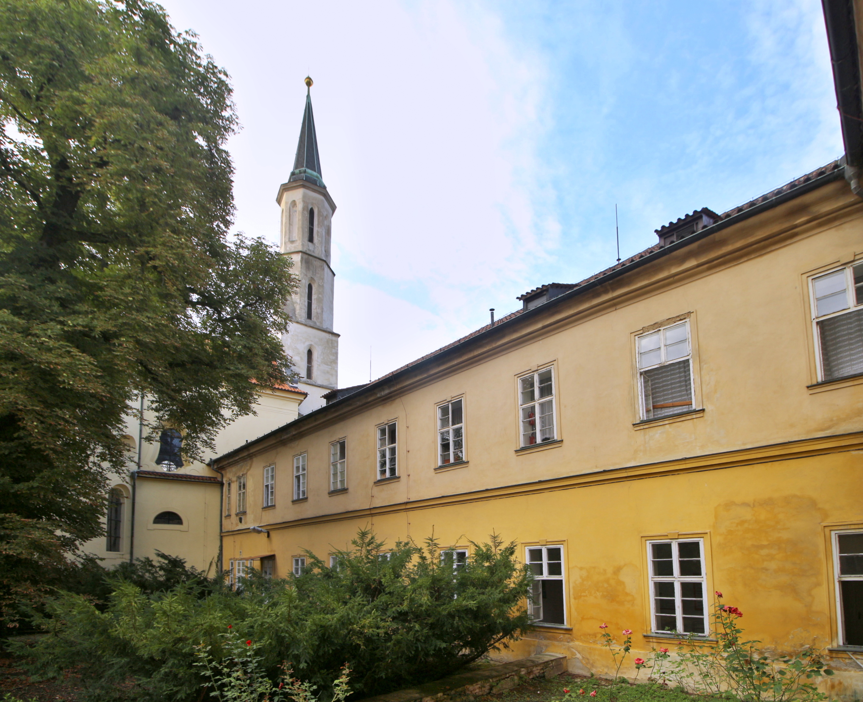 Klášter augustiniánek při kostele sv. Kateřiny v Praze-Novém Městě